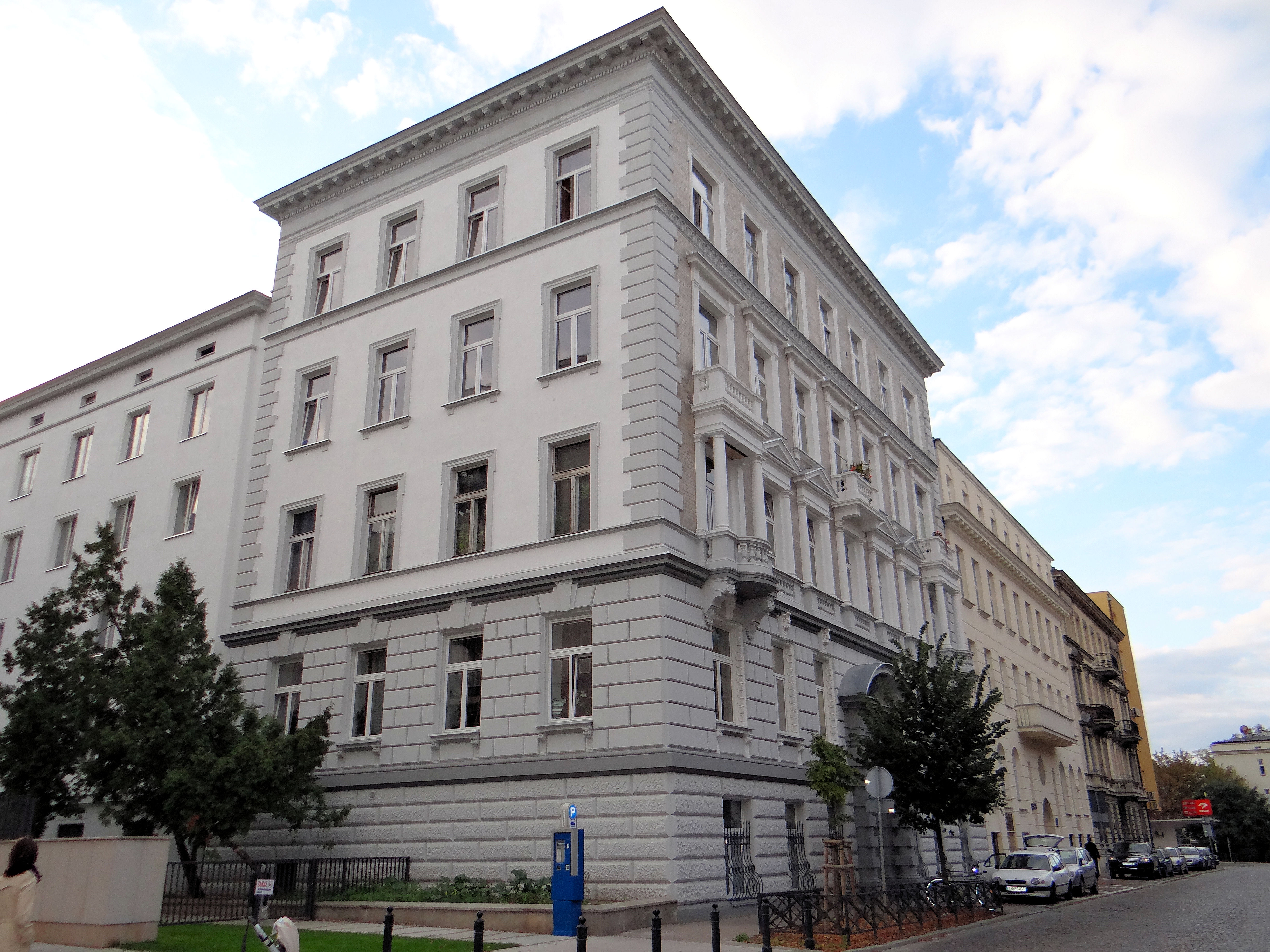 Kamienica wybudowana wraz z sąsiednią w latach 1905, 1910, obie zapisane pod tym samym numerem: 683 z 1.07.1965. Na pierwszym planie Kopernika 11, dalej 13, a w głębi 15